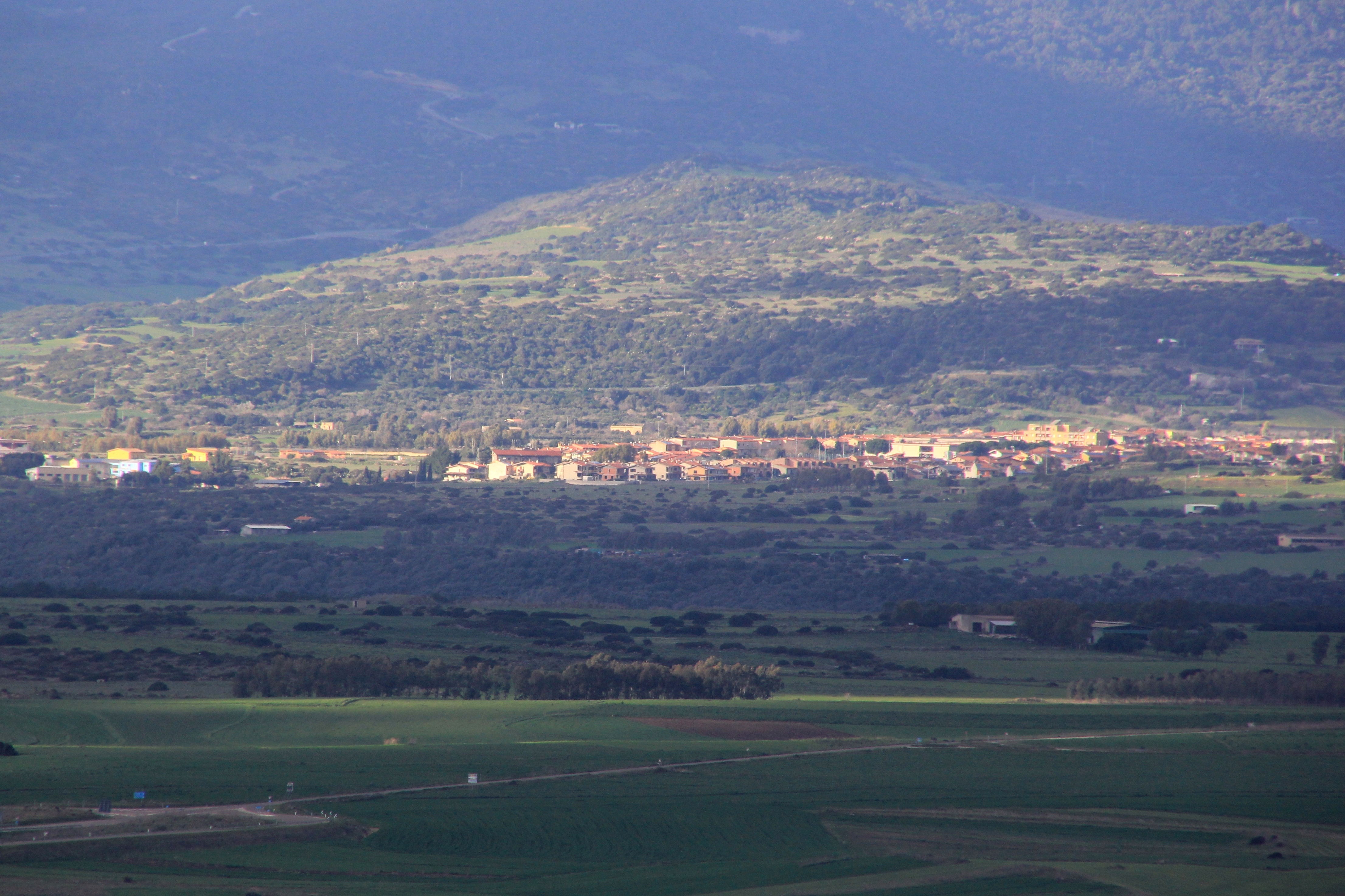 Mogoro - Panorama